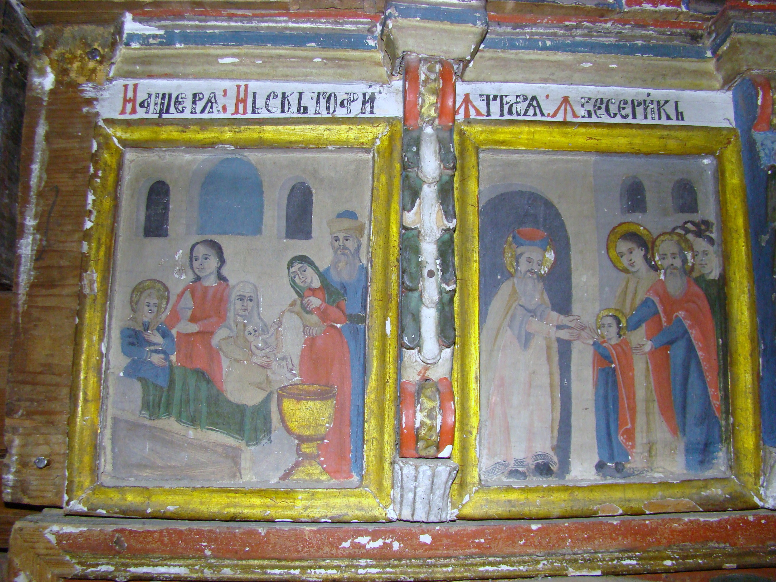 Biserica de lemn "Adormirea Maicii Domnului" a fostei mănăstiri "Izvoru Negru" , sat MOISEI 01